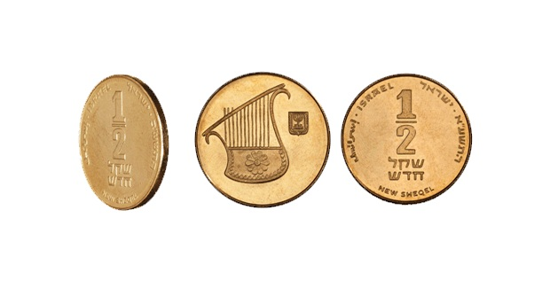 Израильская 1/2 нового шекеля 1985 года выпуска. Гурт, аверс и реверс.